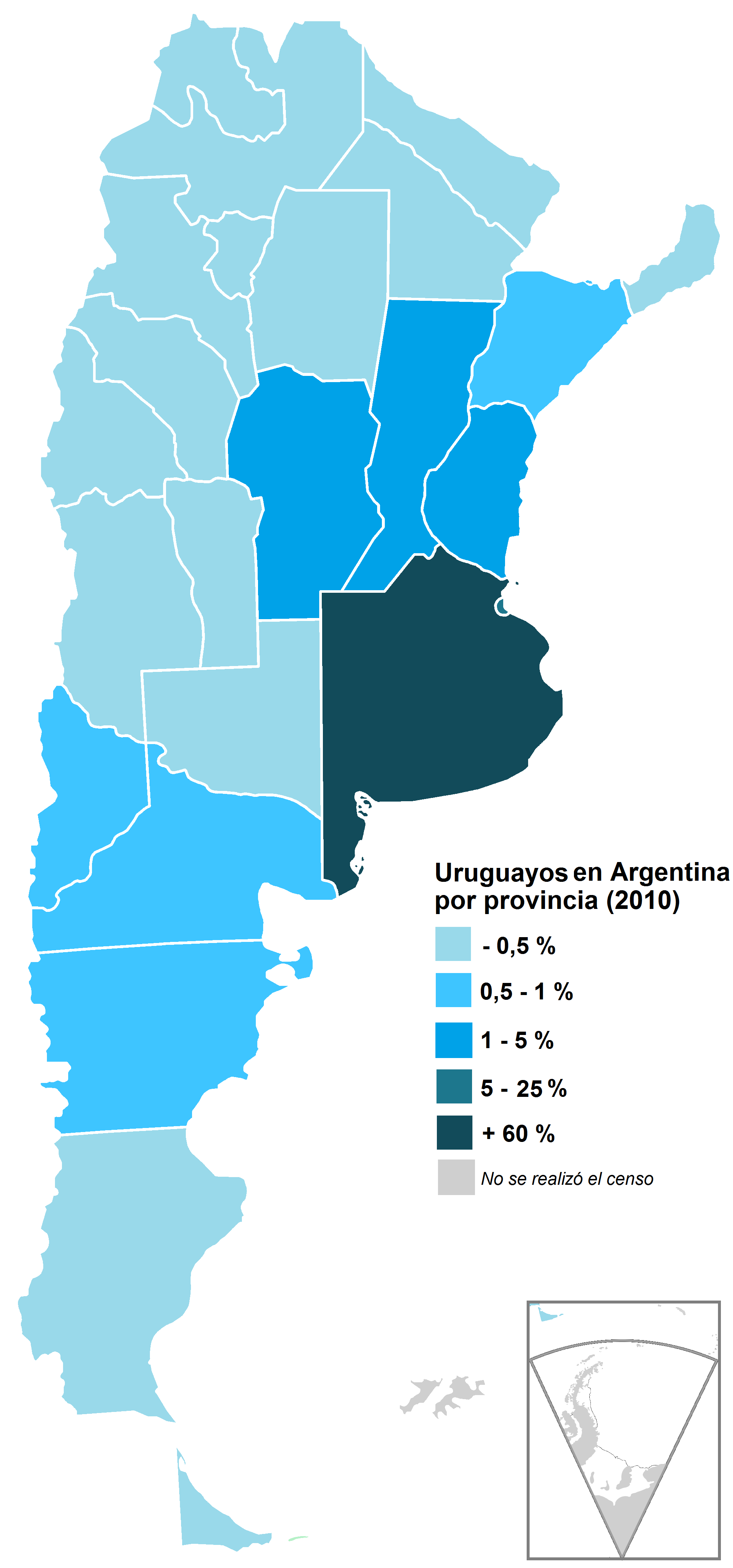 República Argentina por provincia. Población nacida en Uruguay, en porcentaje. Año 2010. Fuente: Censo 2010 - INDEC.